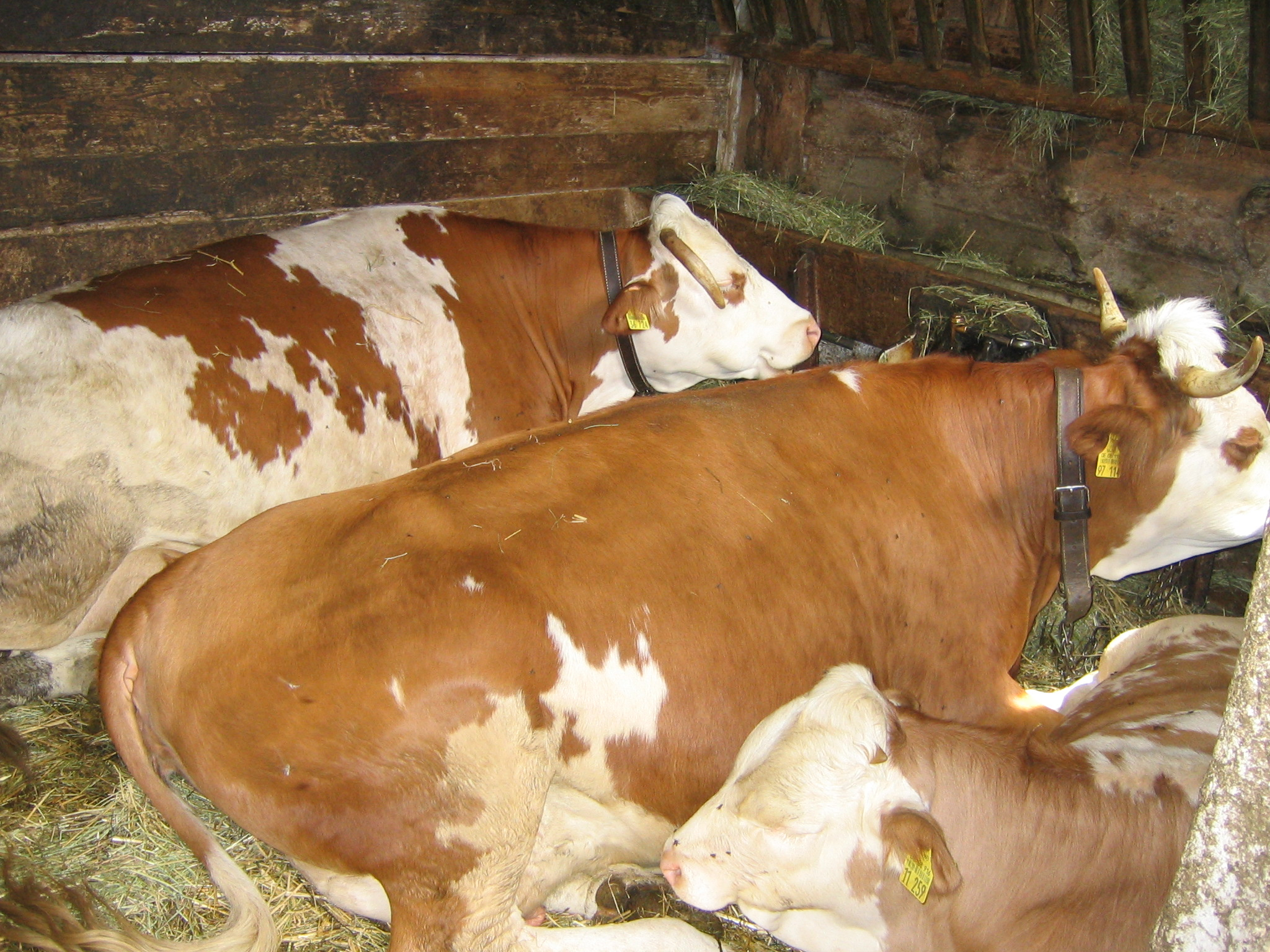 Vorderwälder im Freilichtmuseum Neuhausen ob Eck.